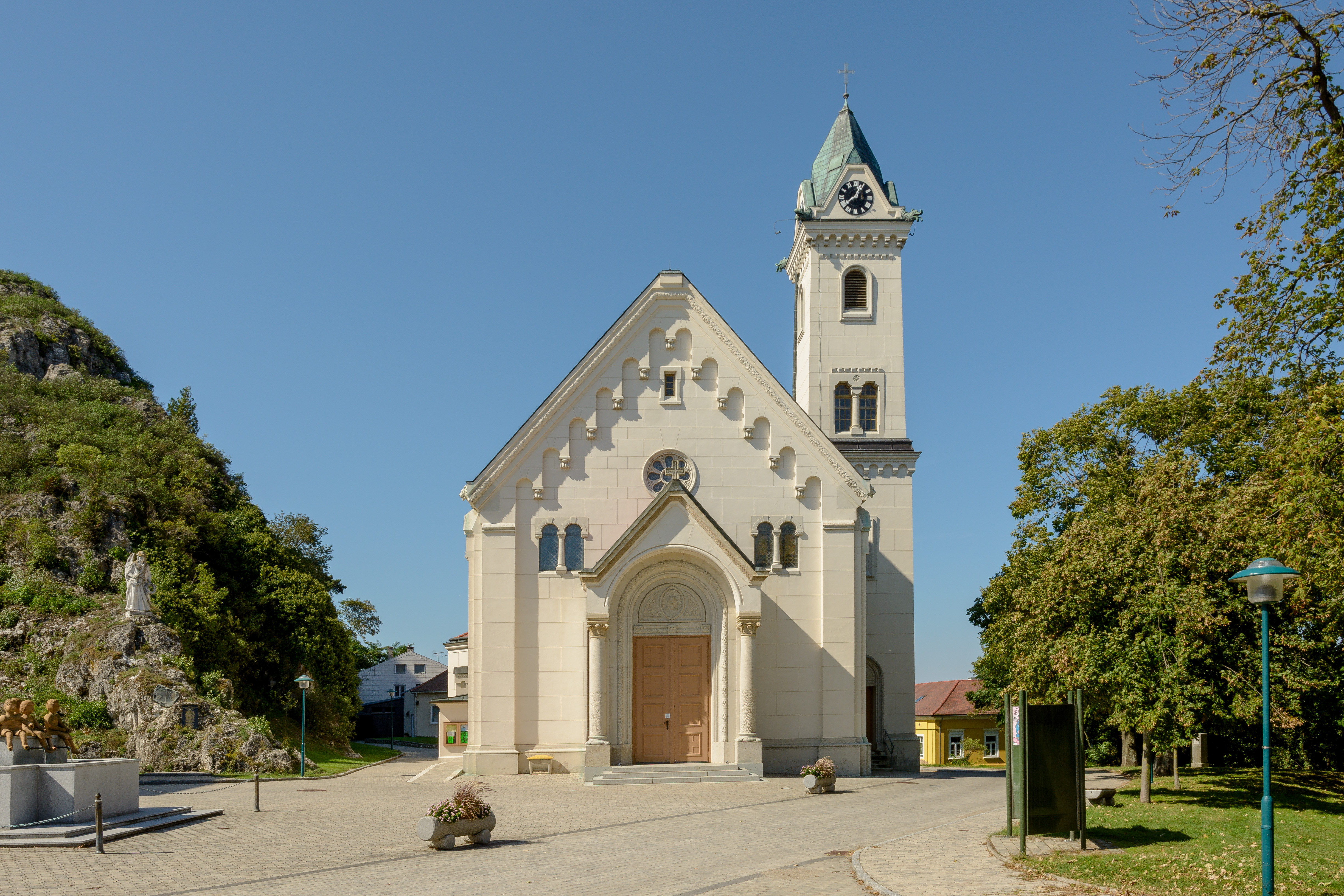 Kirche Staatz